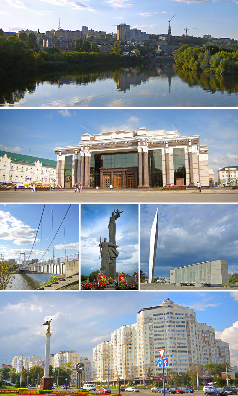 Город Пенза